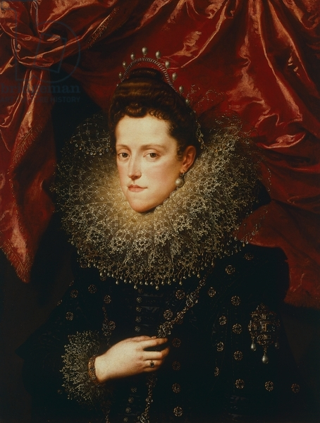 Eleonora de' Medici (1567-1611), wife of Vincenzo I Gonzaga and older sister of Maria de' Medici.